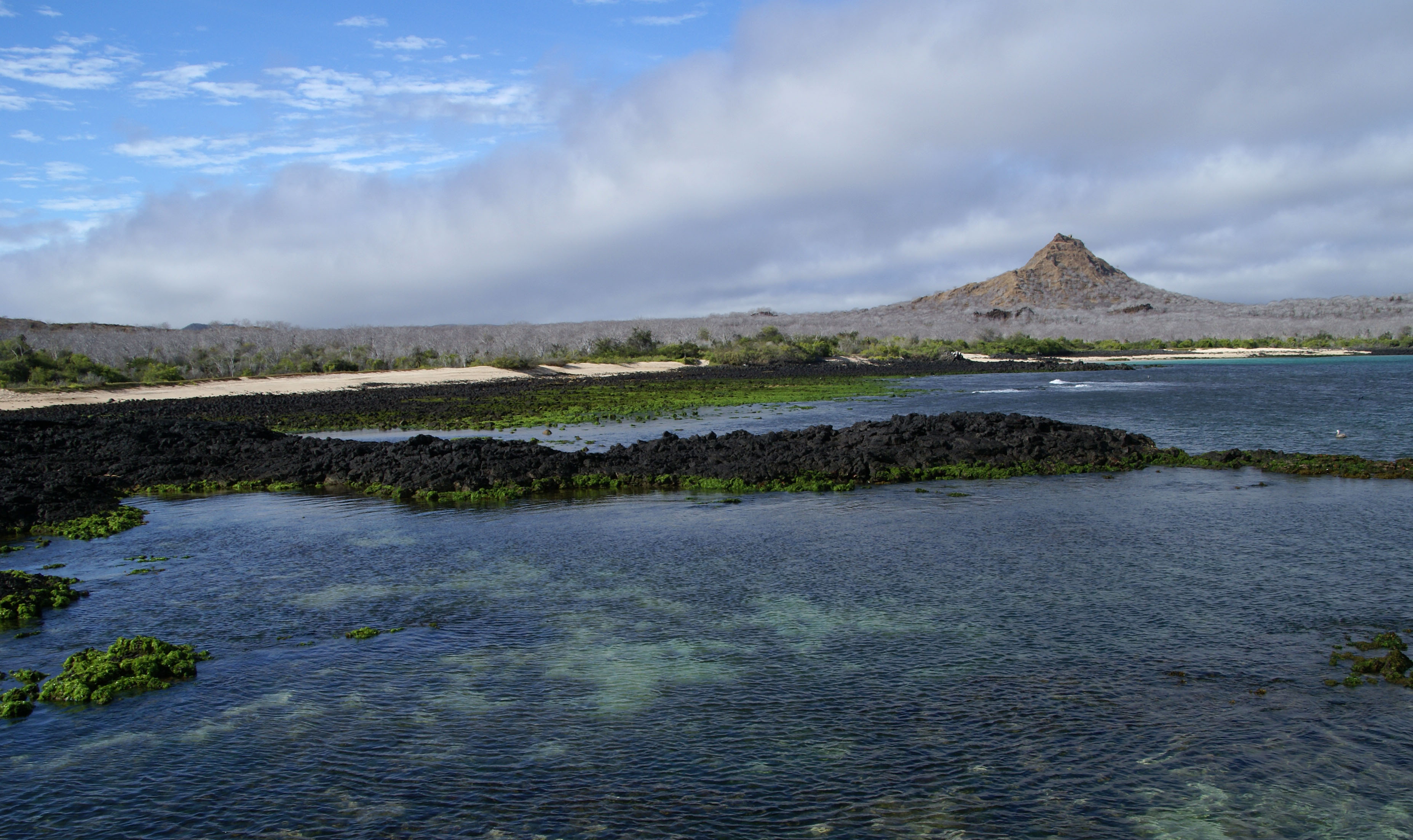 Santa Cruz Cerro Dragon